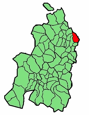 aipaturiko udalerriaren kokapena Nafarroa Beherean